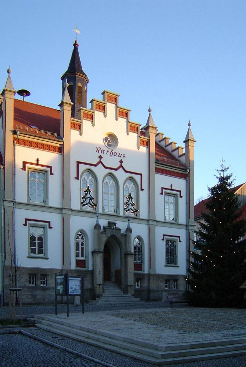 Das Rathaus von Geisa